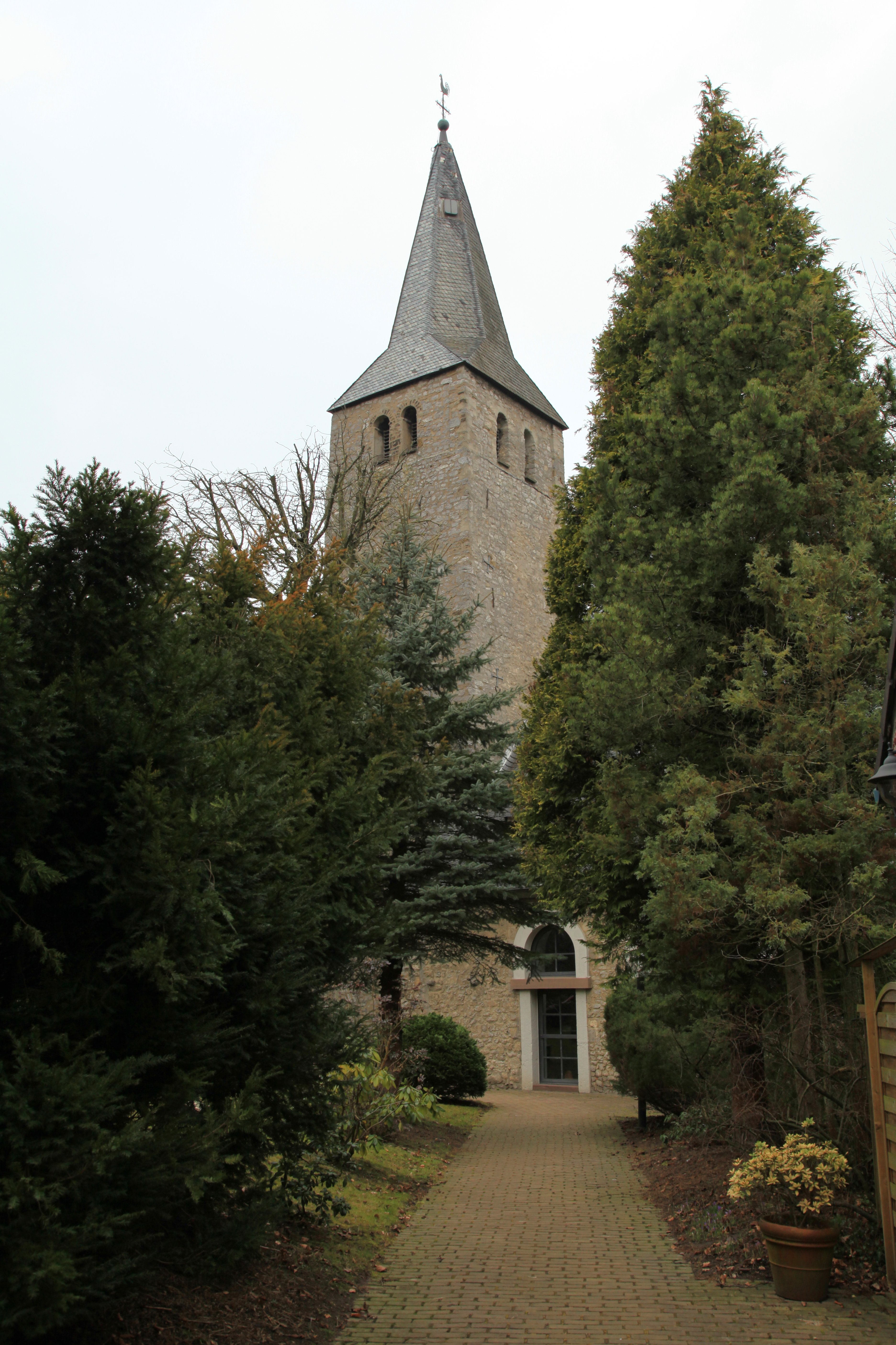 Evangelische Pfarrkirche Schöller, Schöllerweg in Wuppertal